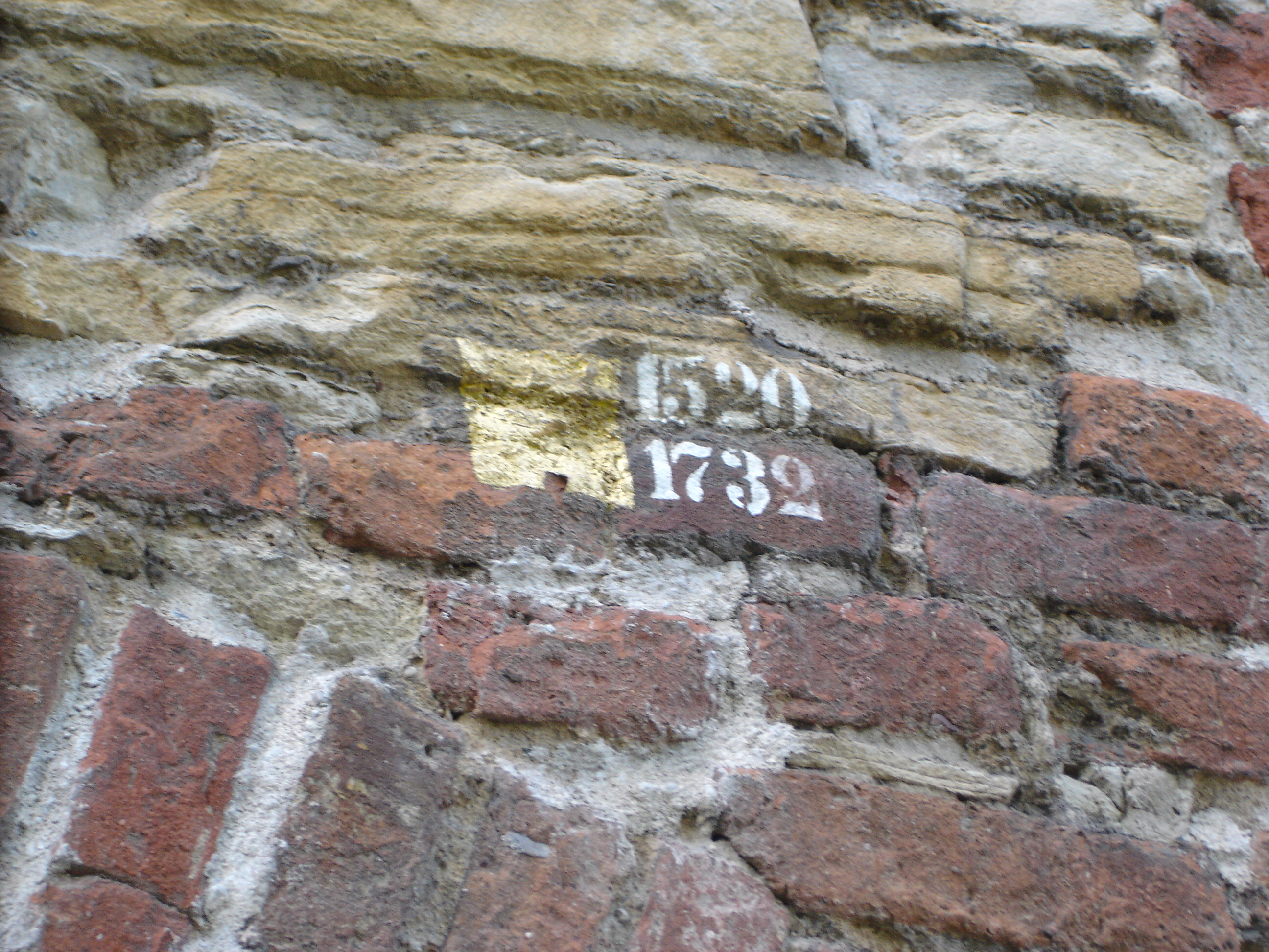 Tag des offenen Denkmals 2006: Jahreszahlen an der Aussenseite des Zwingers in Münster, Deutschland